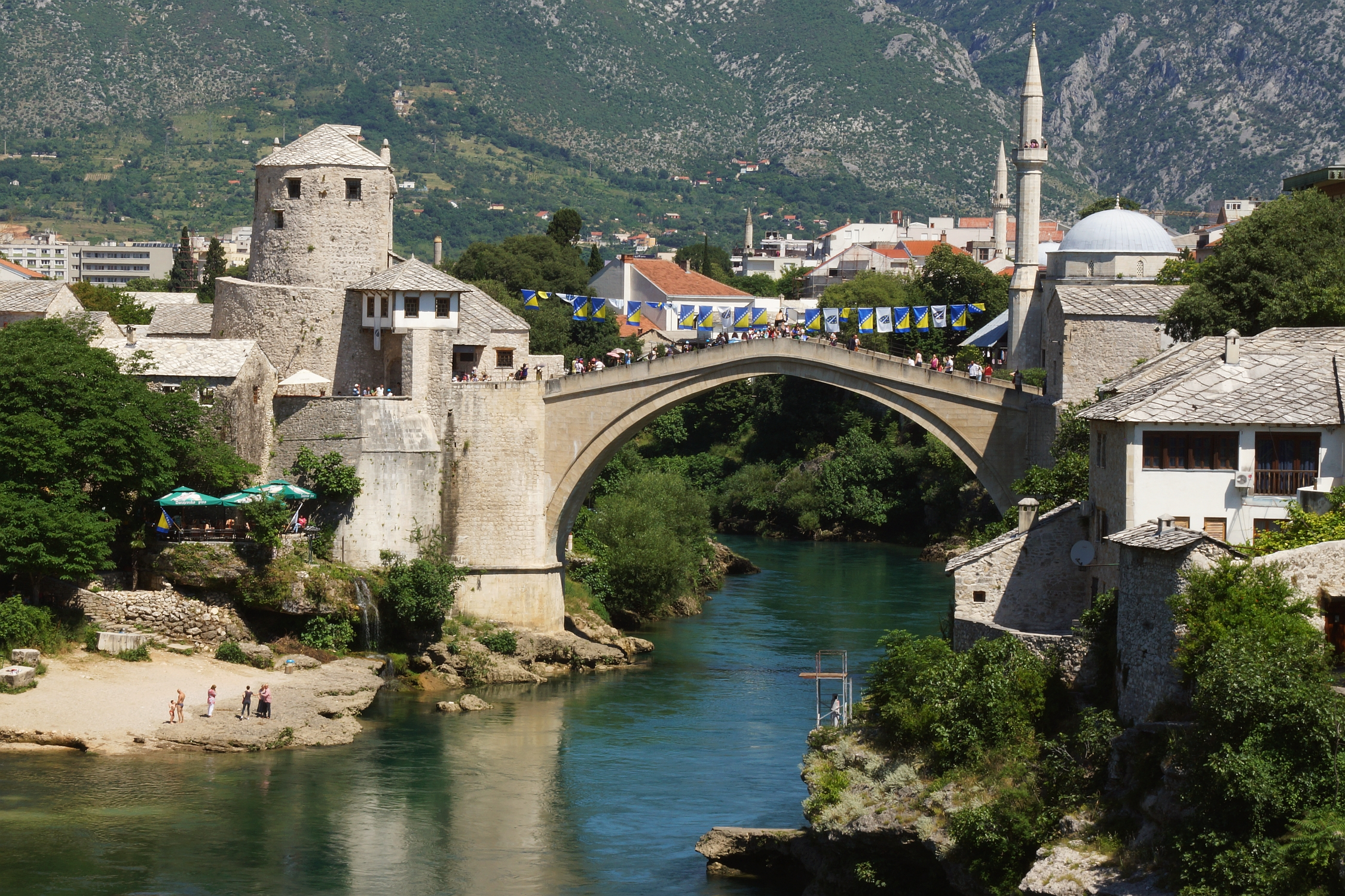 Stari most, die alte Brücke, nach Kriegsschäden in 2004 wiedererrichtet, in Mostar in Bosnien und Herzegowina - Foto Wolfgang Pehlemann IMG_8136.jpg